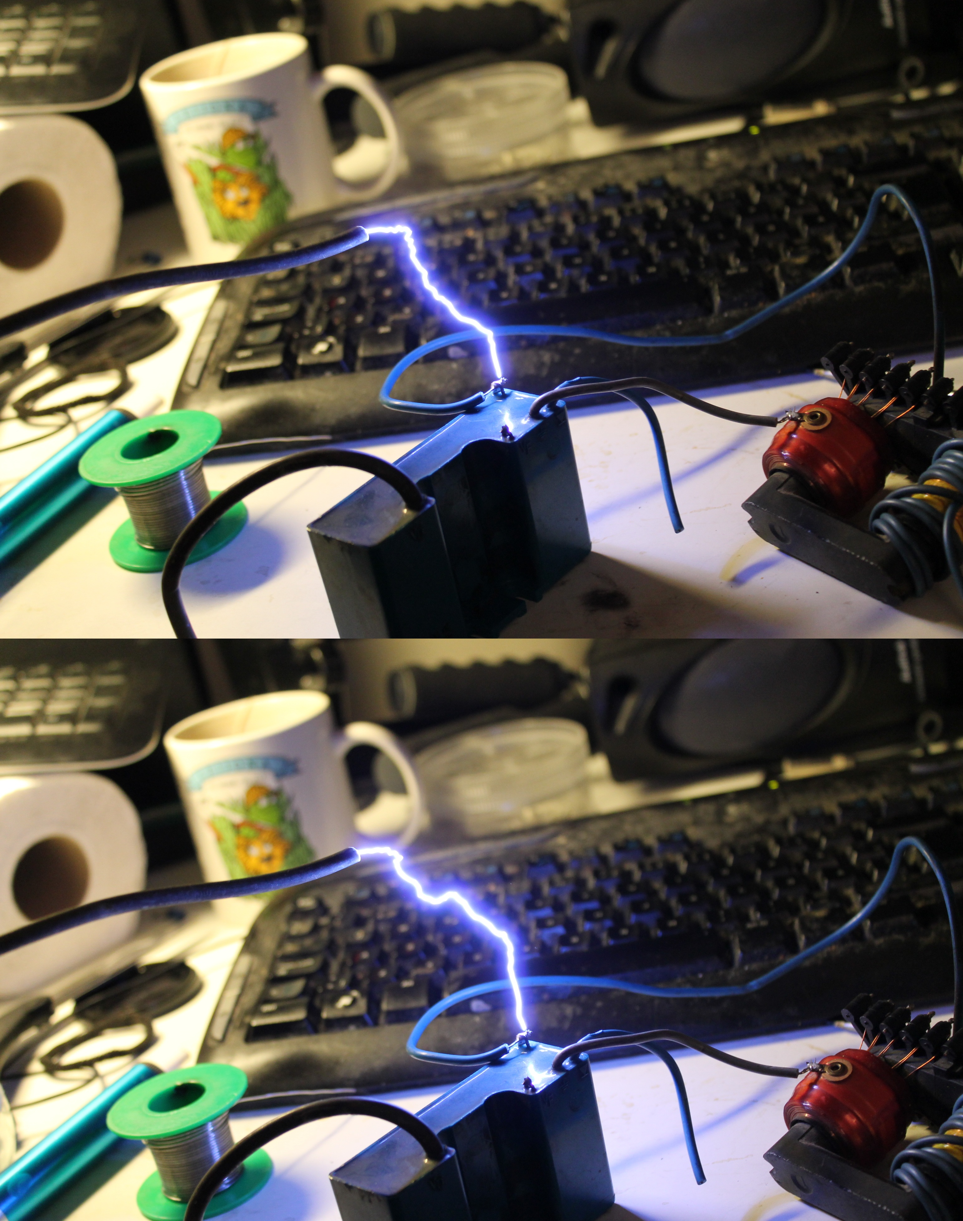 Korkeajännitettä television kaskadilta ja juovamuuntajalta. Virtalähteenä toimii MOSFET- H-silta jota ohjataan NE555-värähtelypiirillä. Syöttöjännite n. 85VDC.